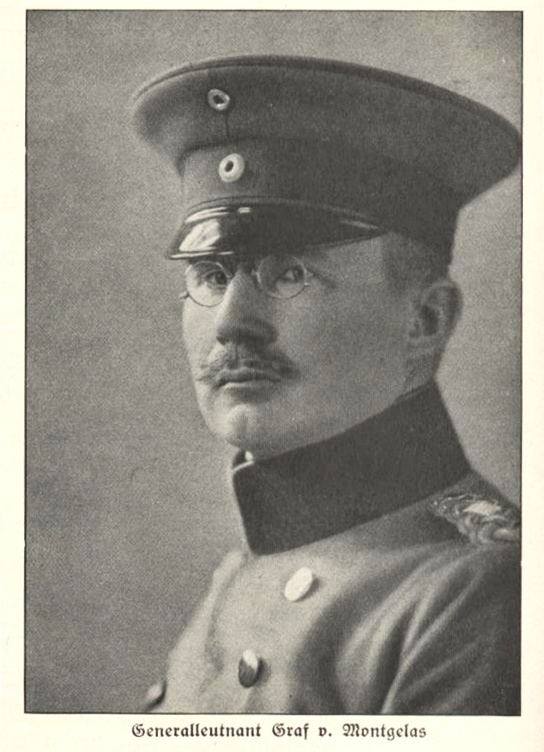 Graf Max von Montgelas (1860-1938) bayerischer Generalleutnant